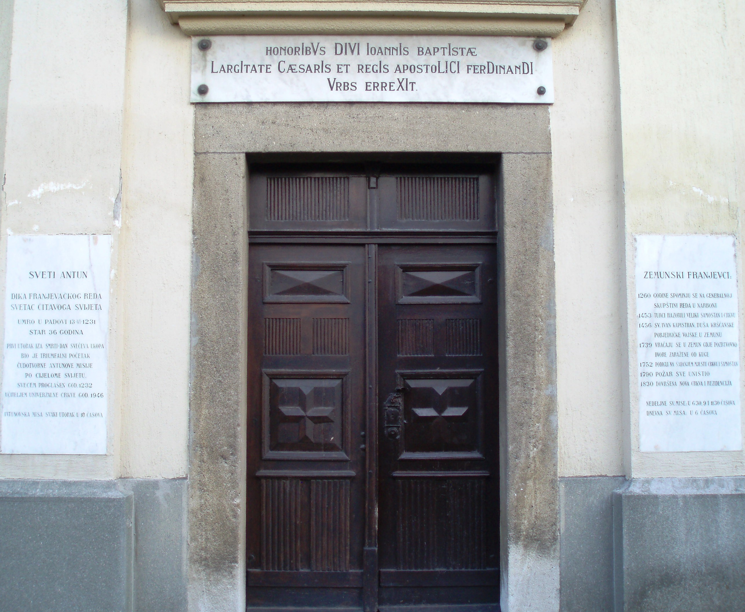 Фрањевачки самостан у Земуну - Улаз у цркву фрањевачког самостана са плочама, аутор:Nicolo